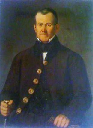 Estéban de Antuñano, fundador de la industria textil mecanizada en México, (1792-1847)